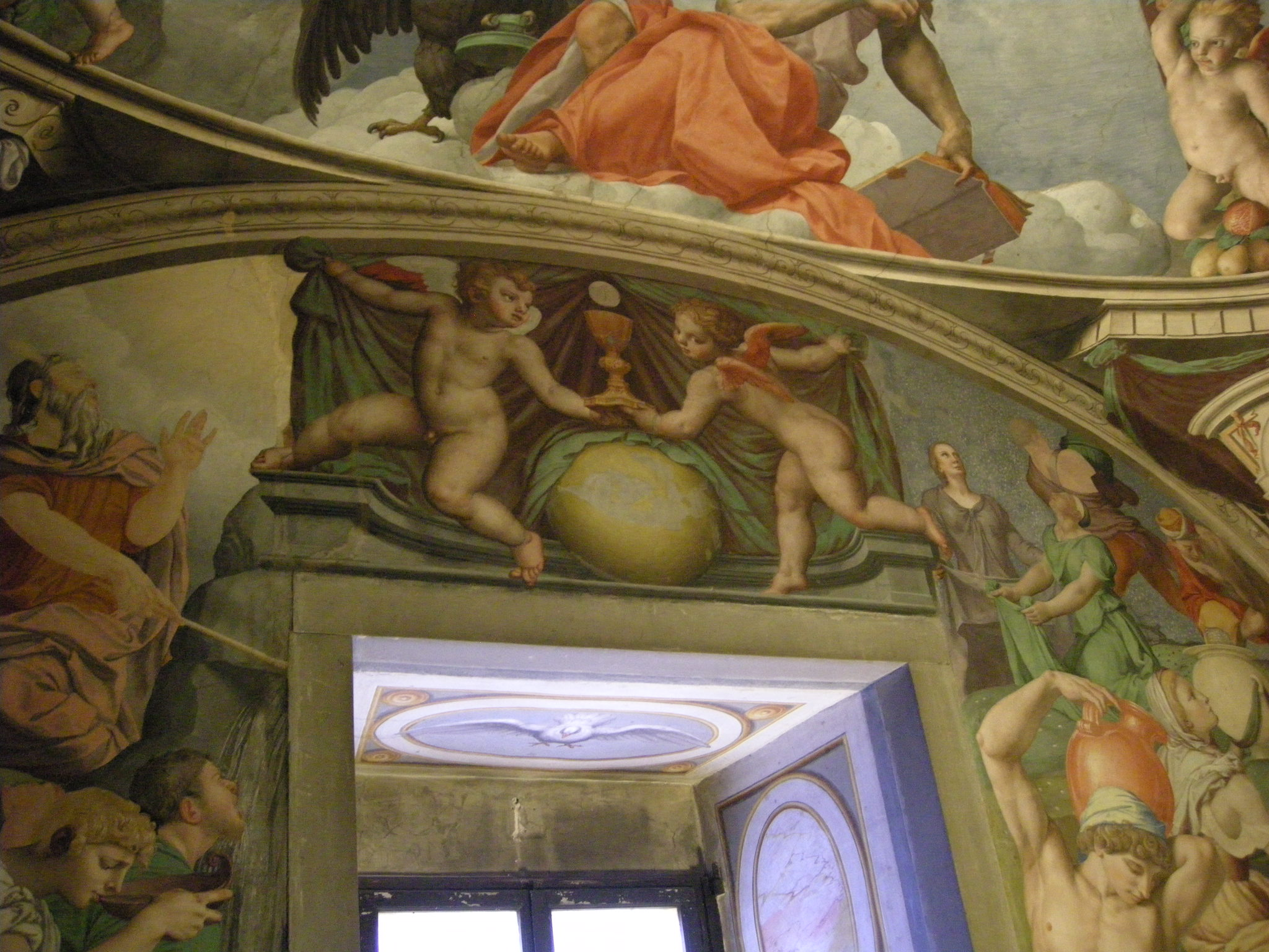 Cappella di eleonora